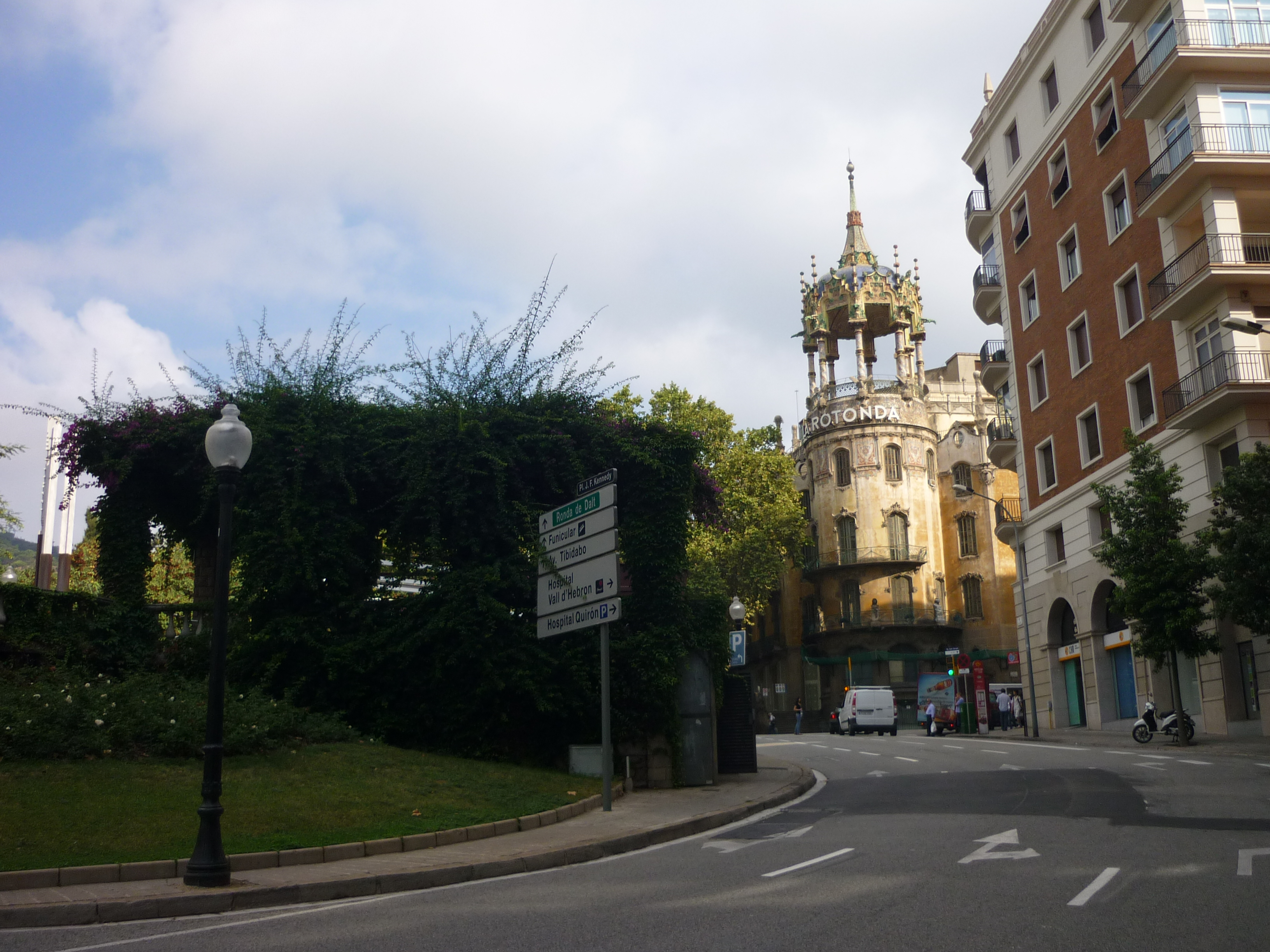 La Rotonda (Barcelona)